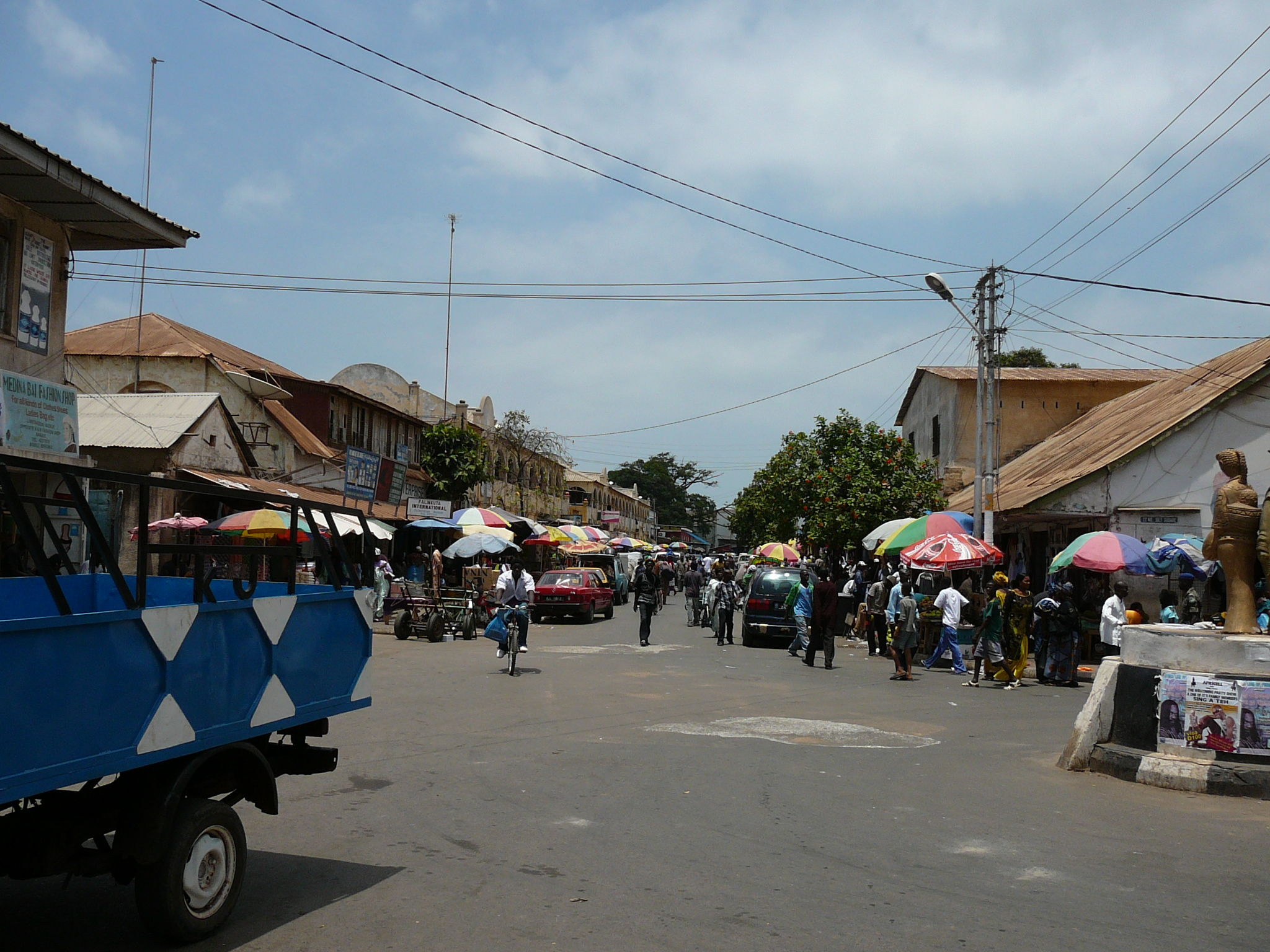 Straße in Banjul